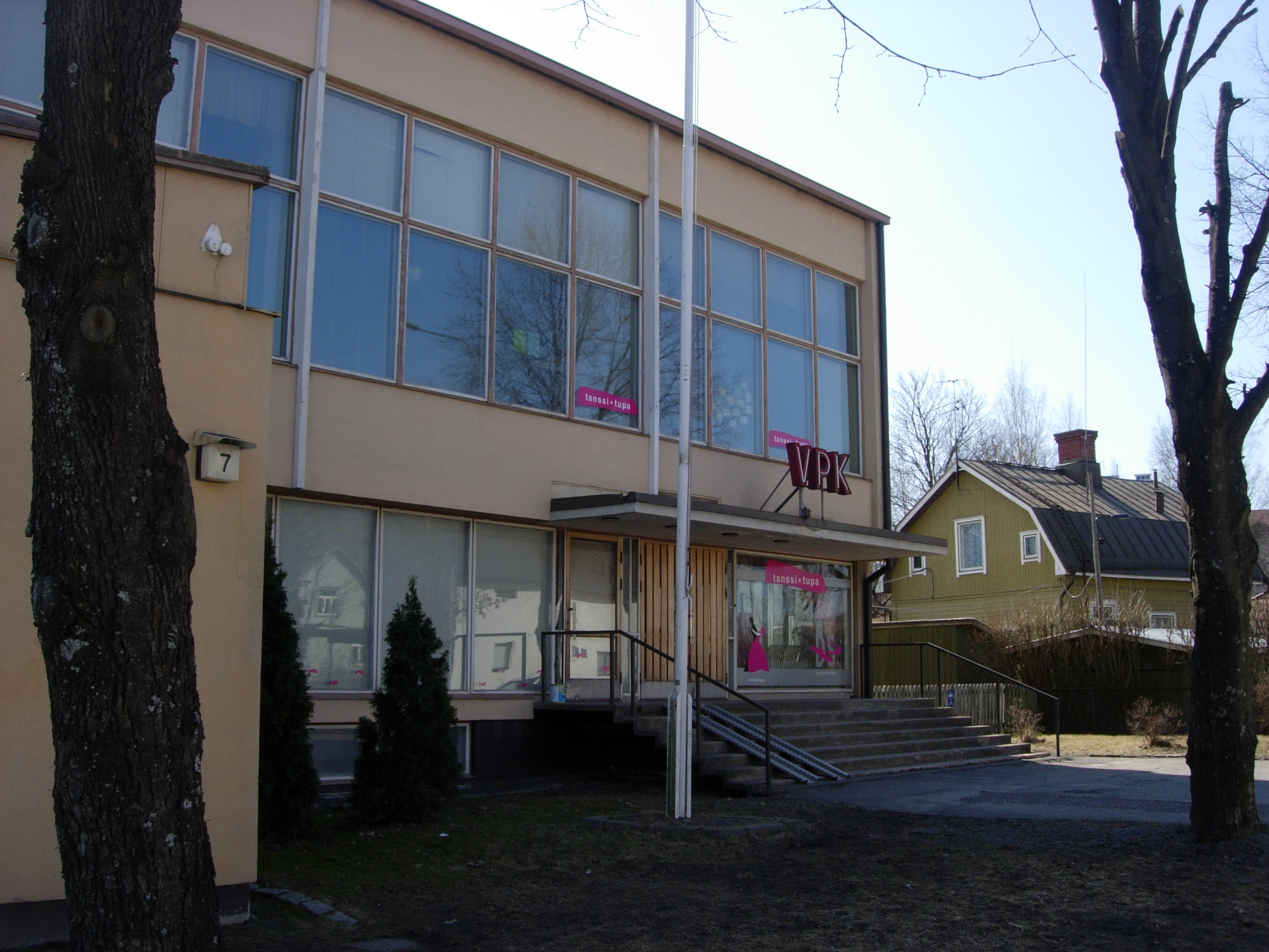 Maarian VPK